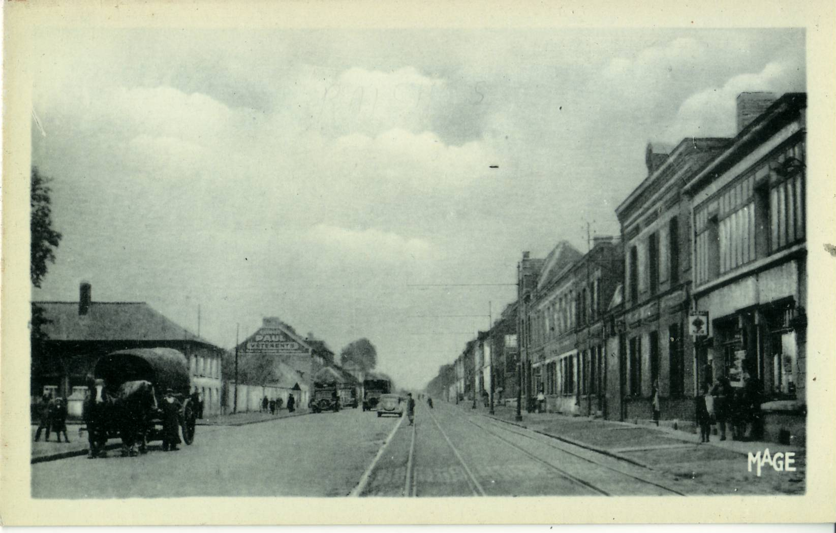 carte postale ancienne éditée par MAGERAISMES - Rue Henri DurreVue au premier plan de la plate-forme de l'ancien tramway de Valenciennes